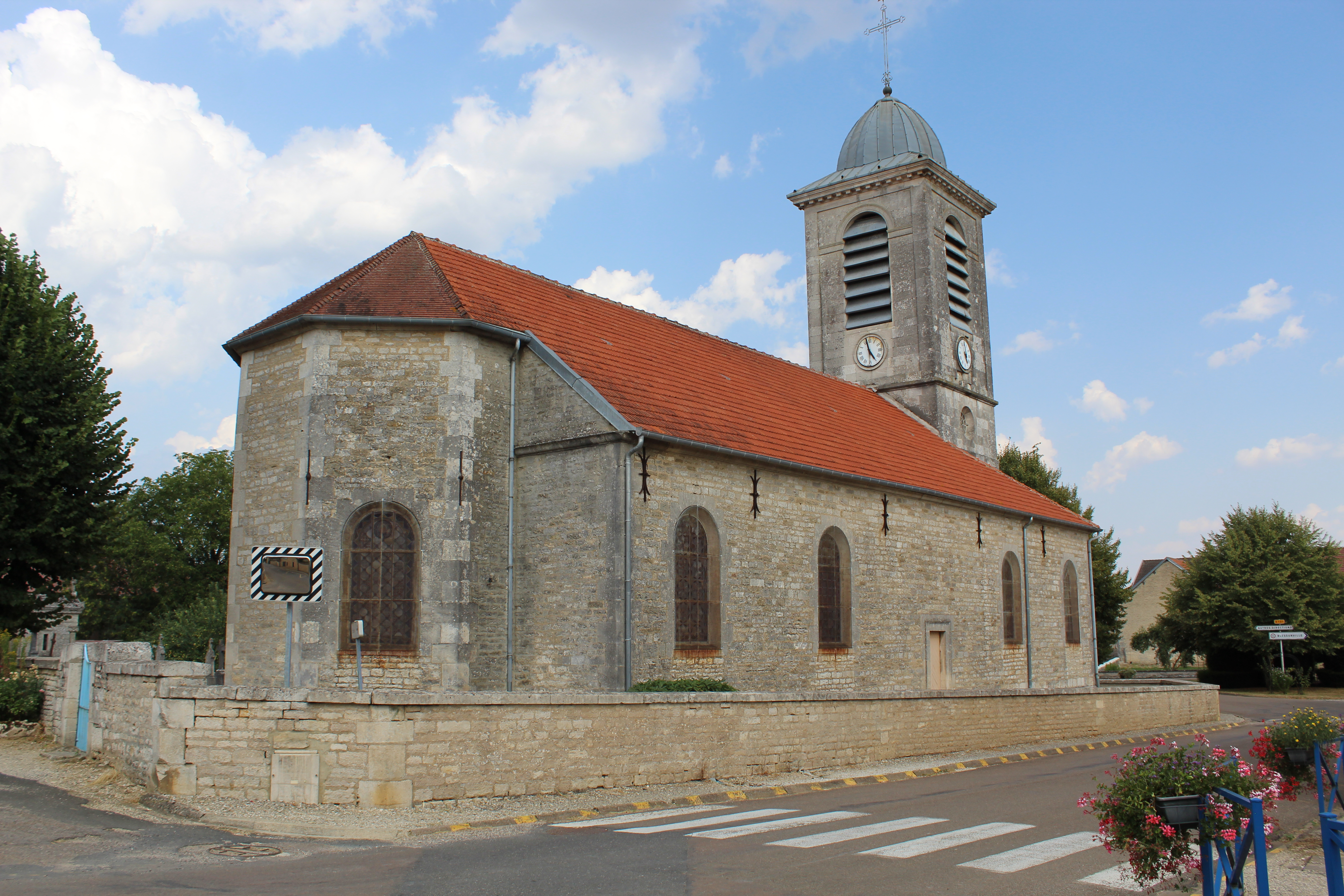 L'église